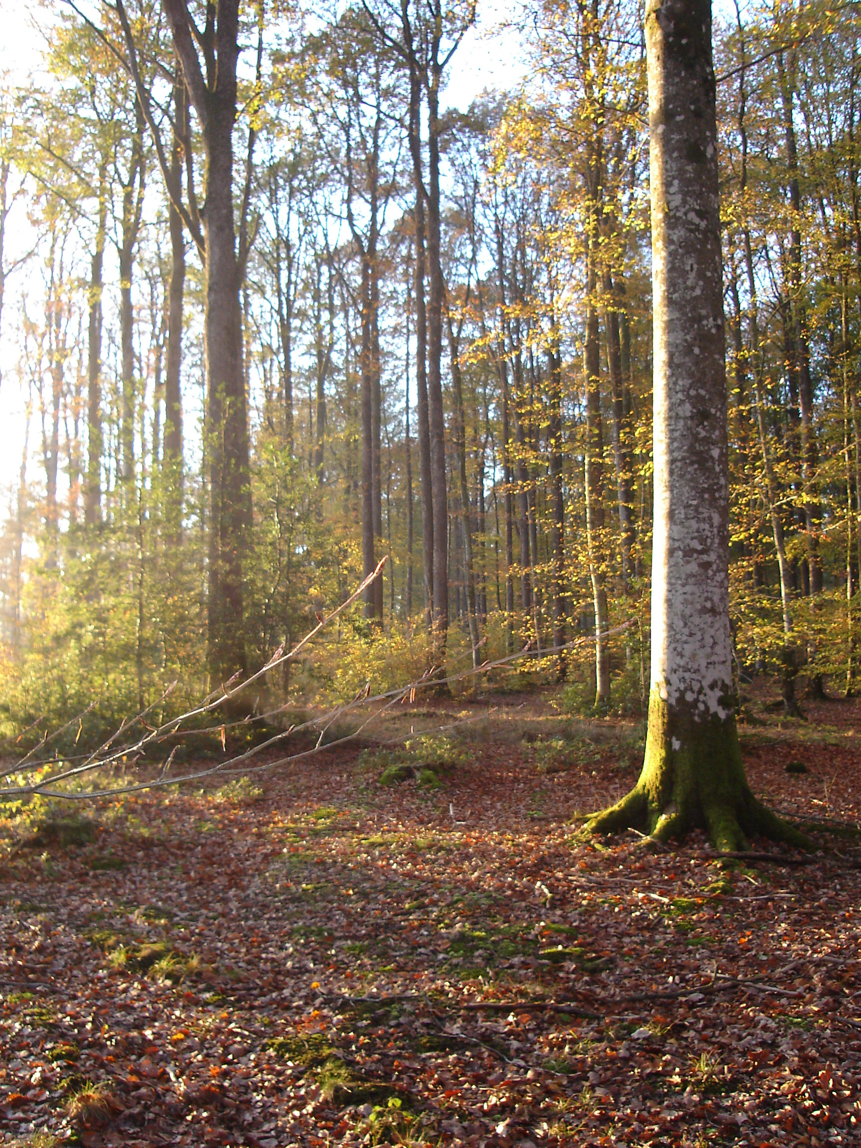 Forêt de Senonches à l'automne, Eure-et-Loir (France).